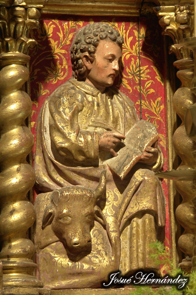 Relieve de San Lucas. Retablo de Nuestra Señora de la Inmaculada Concepción. Lázaro González de Ocampo Parroquia Matriz de Nuestra Señora de la Inmaculada Concepción. Villa de La Orotava, Tenerife.